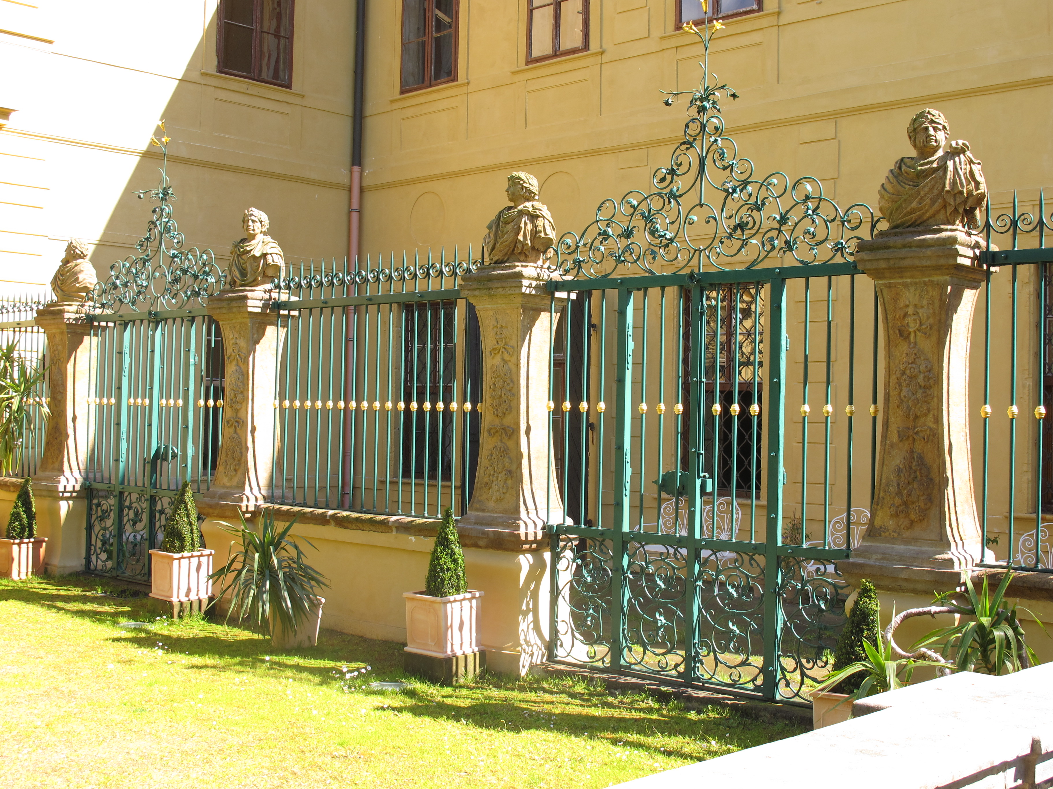 Zámek Jezeří, Jezeří čp. 1